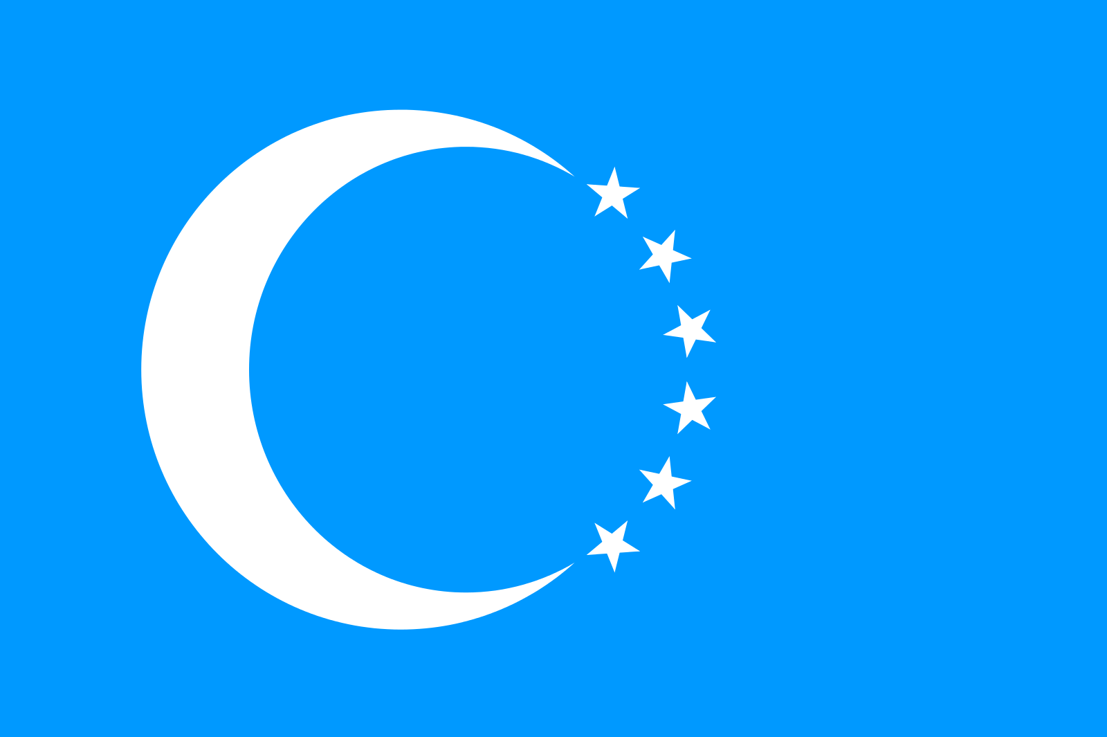 علم حزب الجبهة التركمانية العراقية